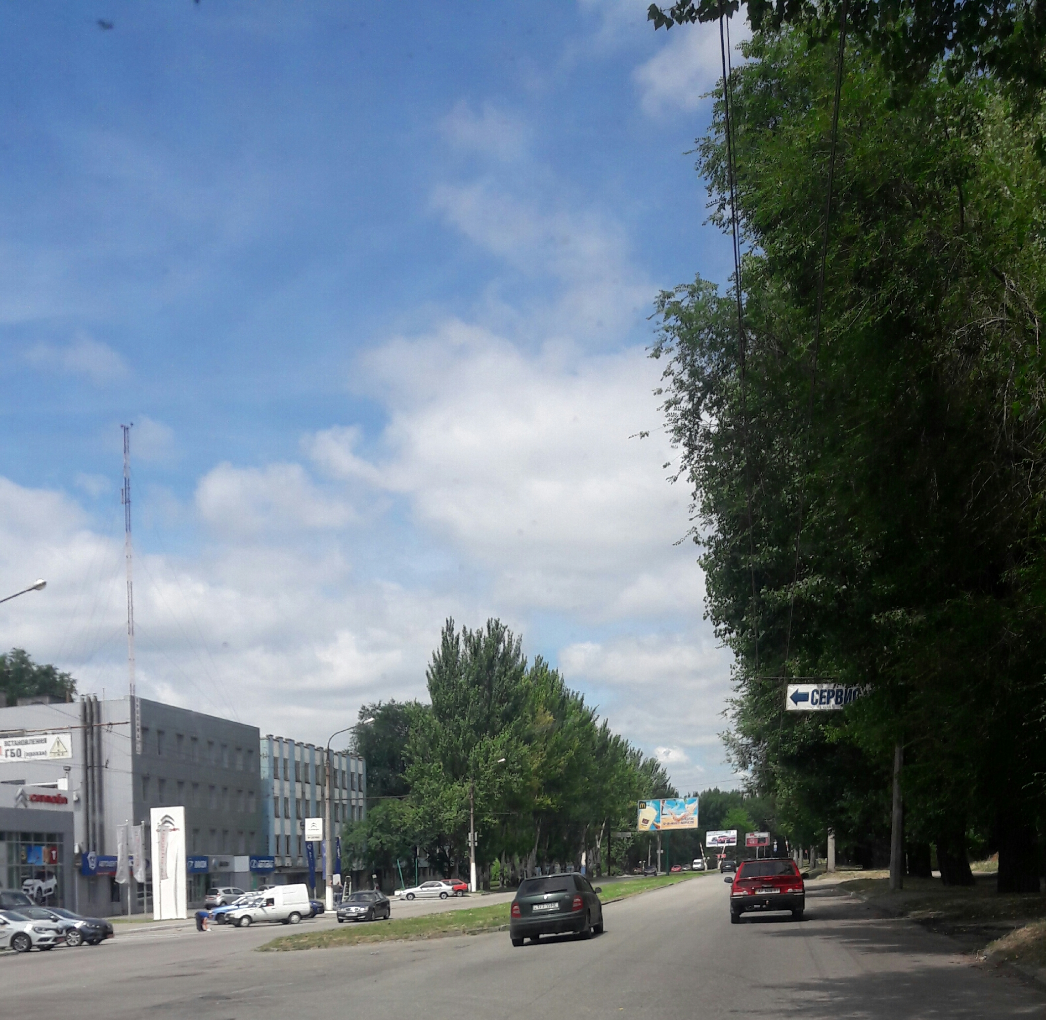 Запоріжжя, Вознесенівський район, Південне шосе (липень 2017)